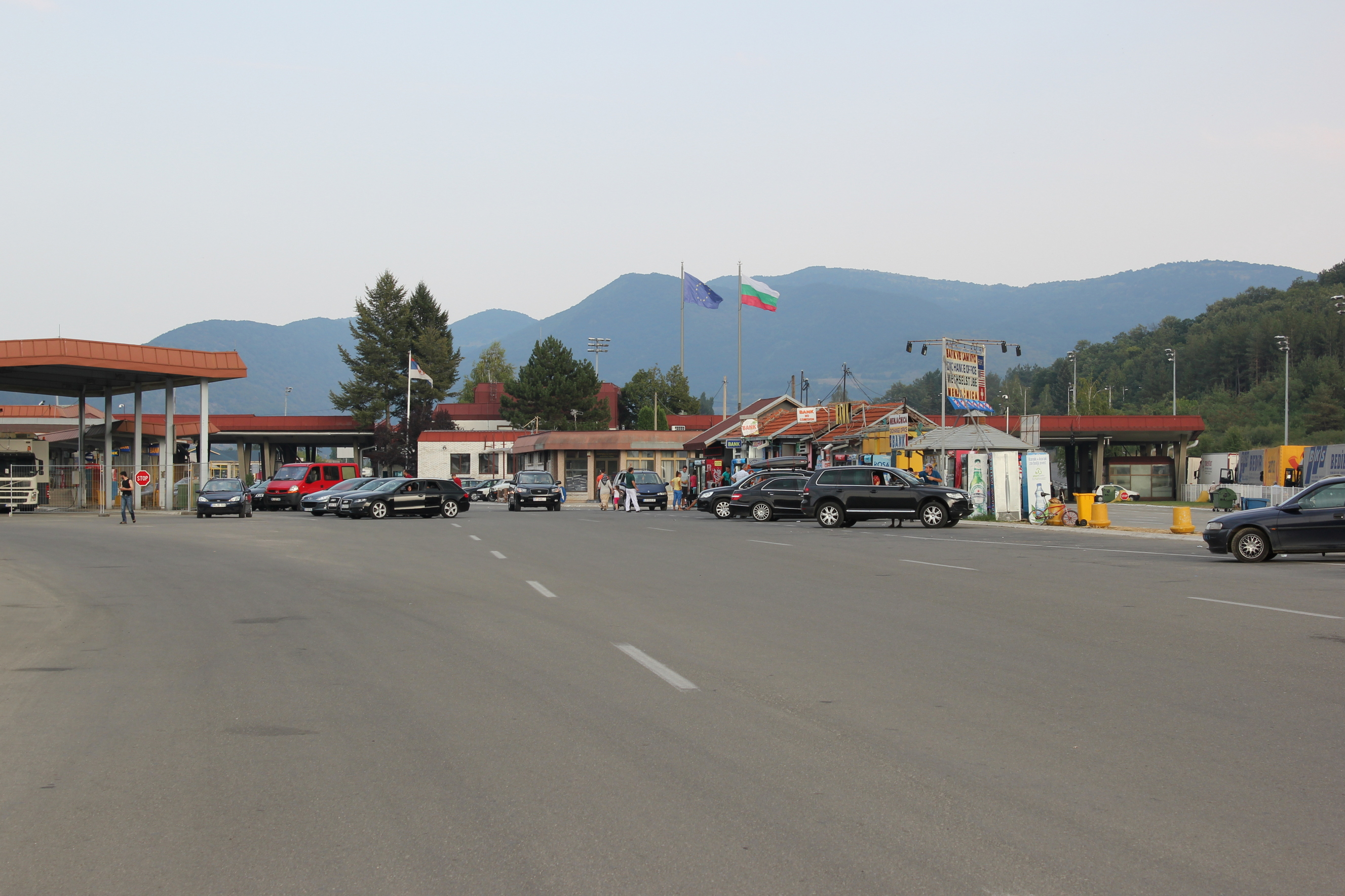 Hornjoserbsce: Bołharsko-serbiska hranica mjez Dragomanom a Dimitrovgradom.